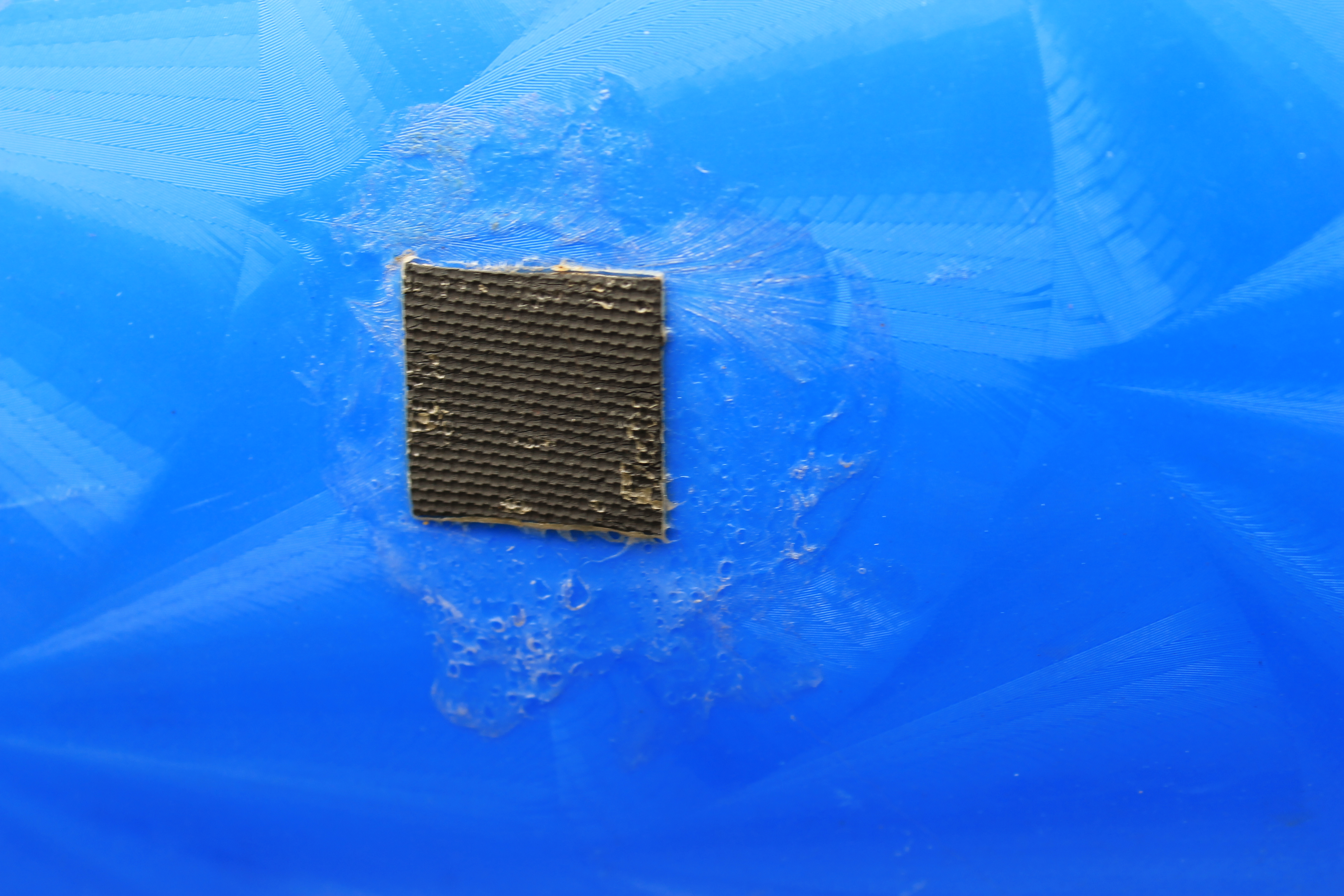 Ein Flicken an einem Pool.